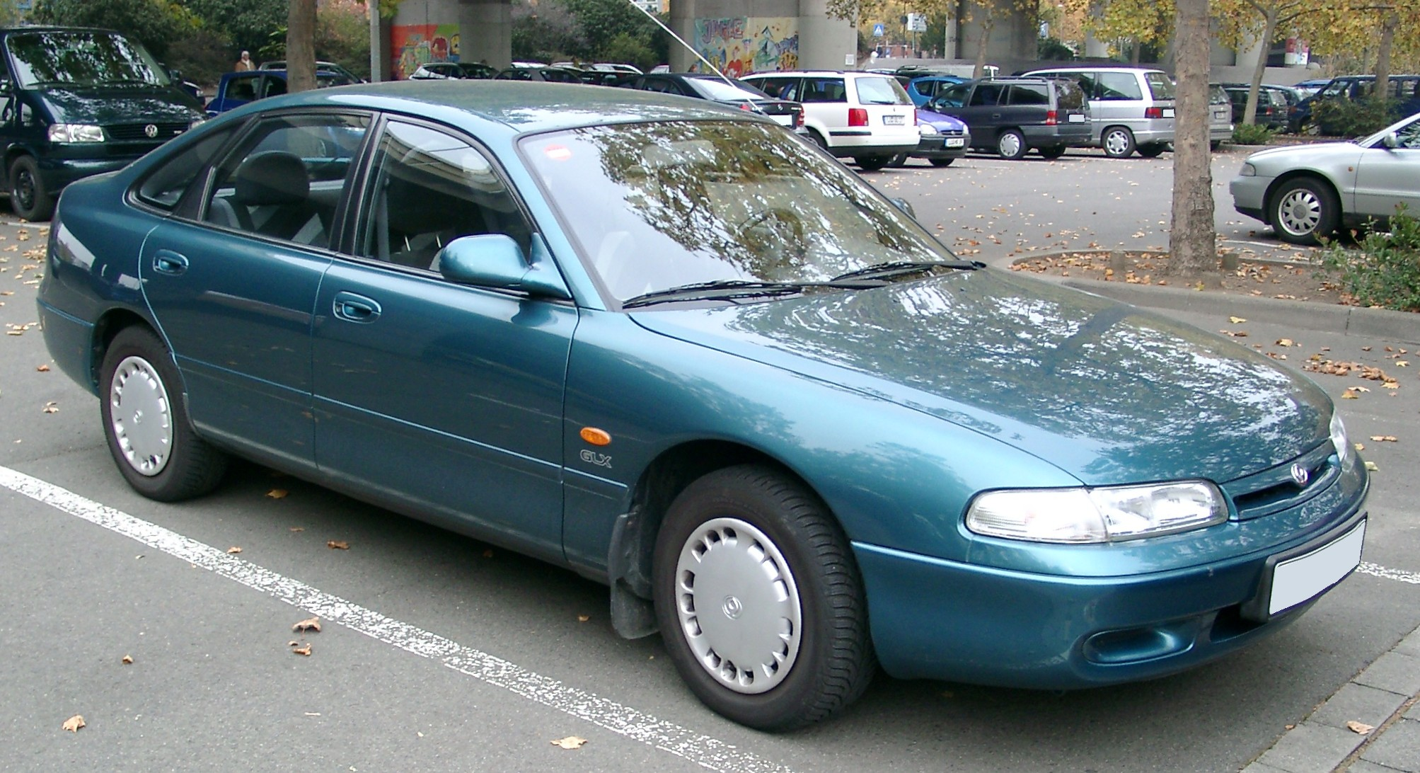 Mazda 626